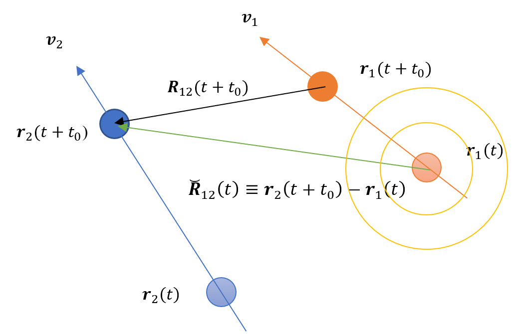 Positioner för två partiklar vid två olika tidpunkter, samt en sfärisk våg som sänds ut från en av dem.